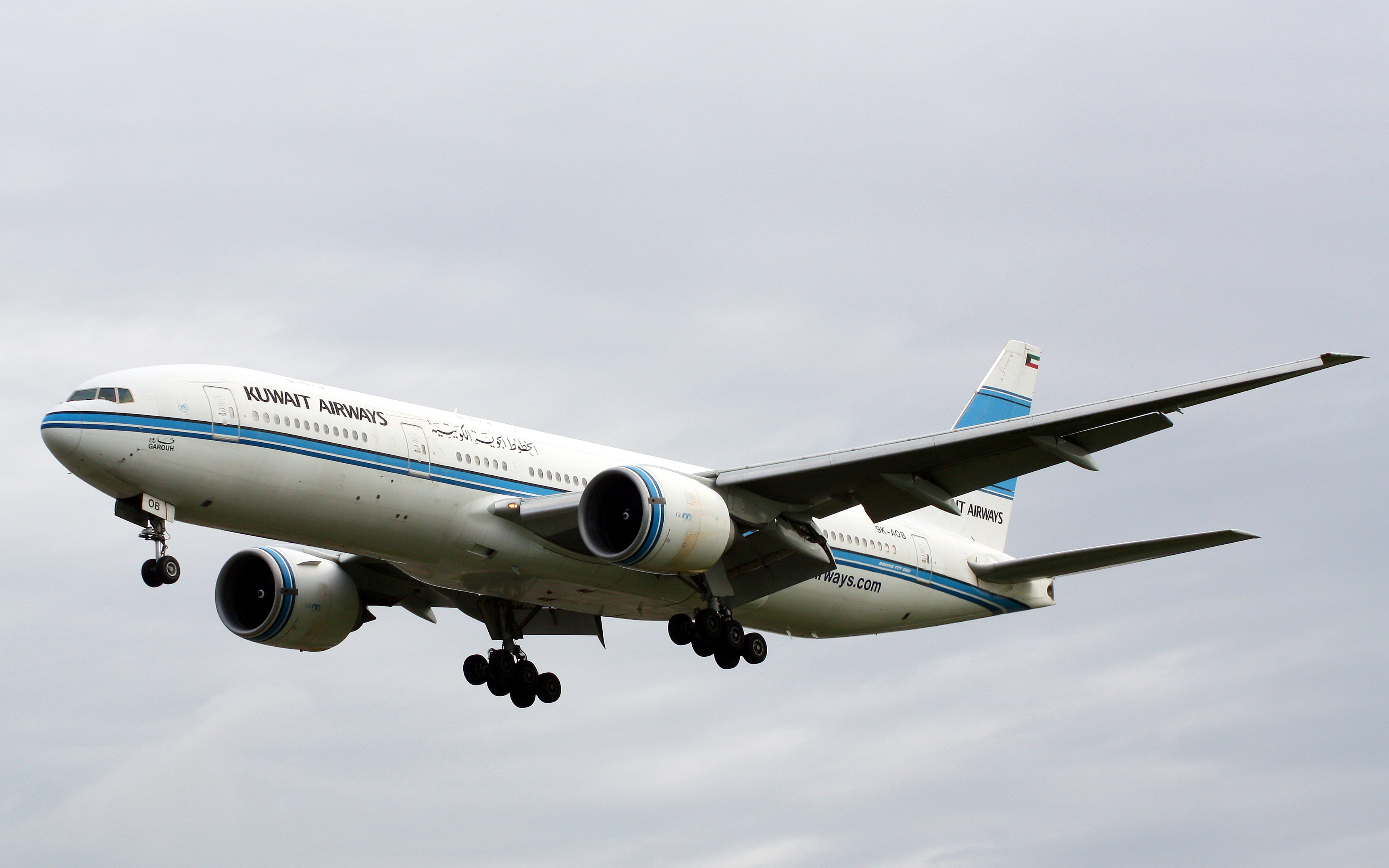 Kuwait Airways B777-200ER 9K-AOB